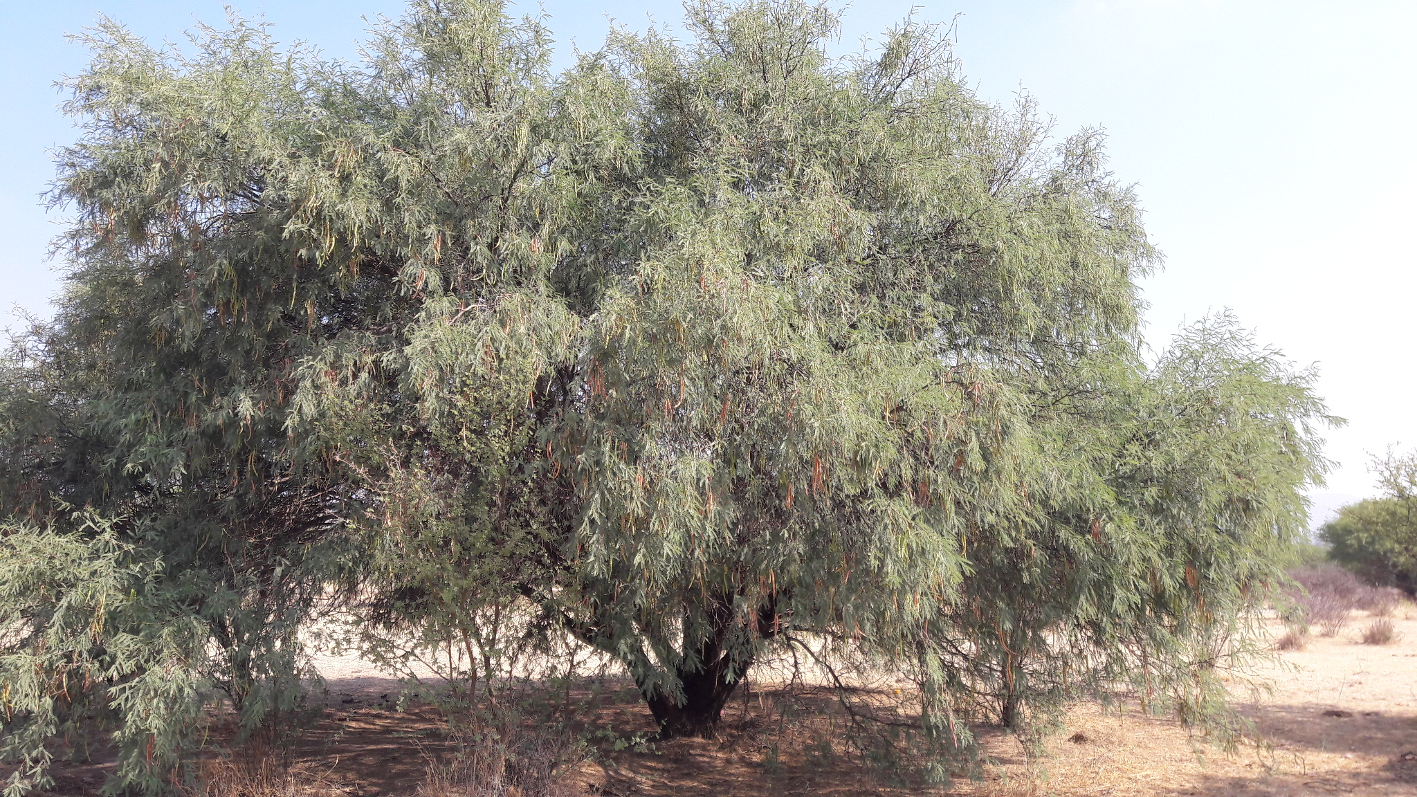 Mezquites cerca de la presa el Chichimeco, en Jesús María, Aguascalientes.